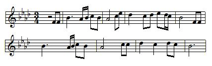 Mjaskowskis 6. Sinfonie, 4. Satz: "Die Seele Hat Sich Vom Körper Gelöst"